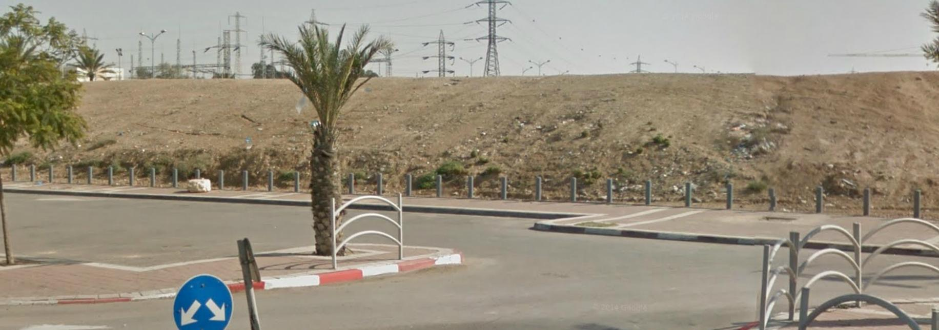 תל עוזיהו עליו נמצאו שלוש כנסיות ביזנטיות הוא חלק מתל באר שבע, תל שעליו הייתה התיישבות מהתקופה הכלקוליתית וגם העיר באר שבע הקדומה שכנה עליו